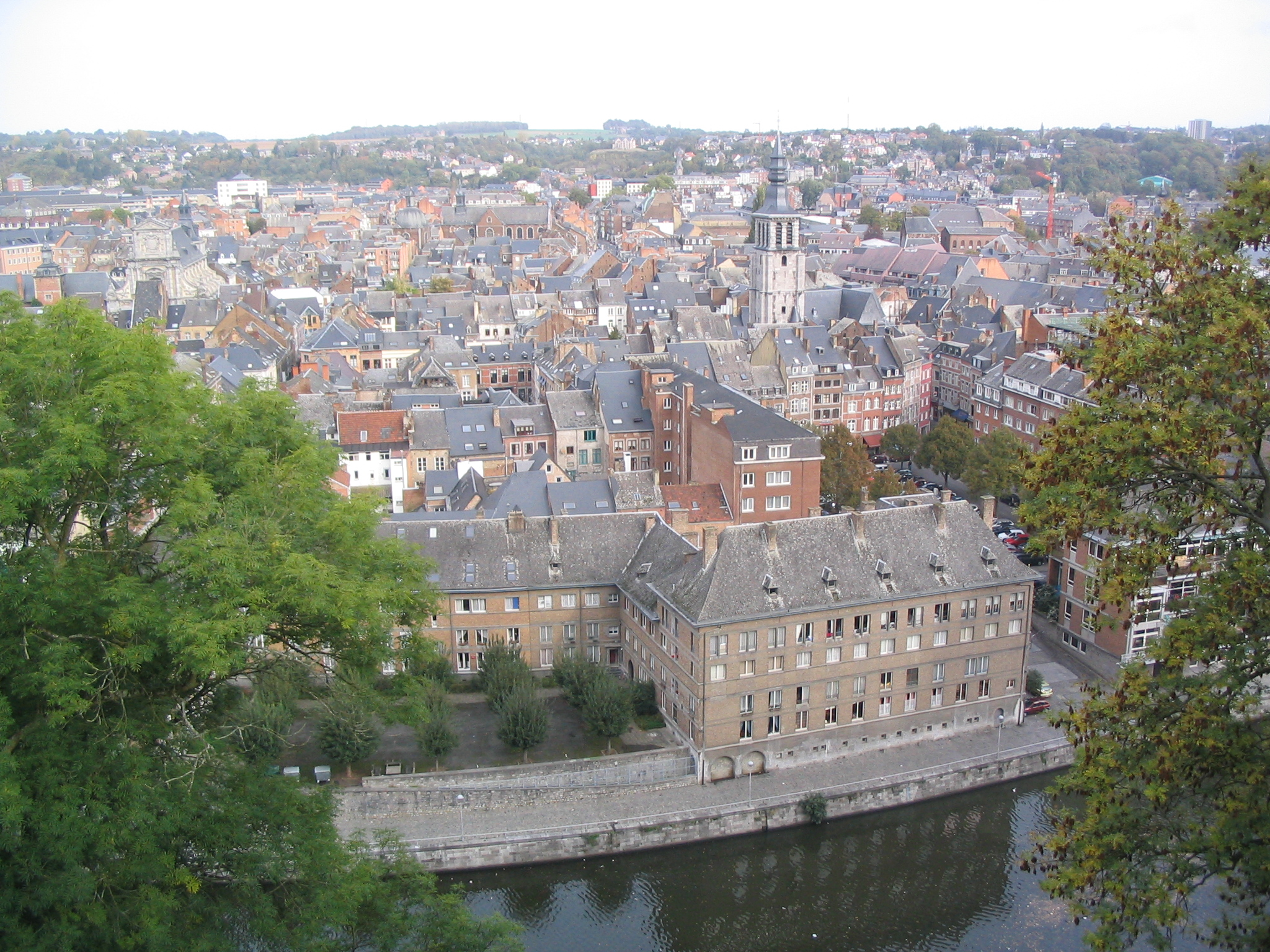 Vue de la ville de Namur.